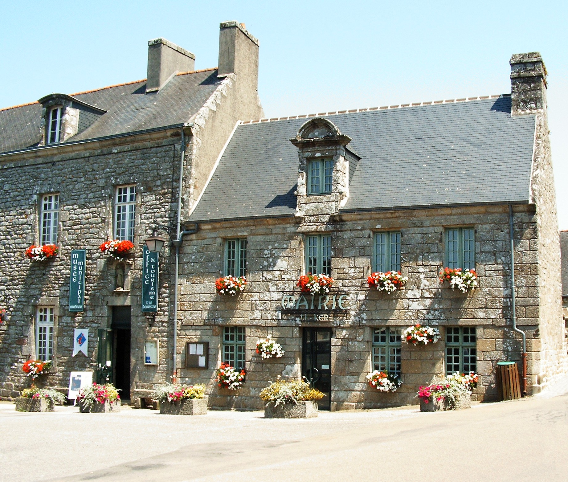 Mairie + Museum in Locronan